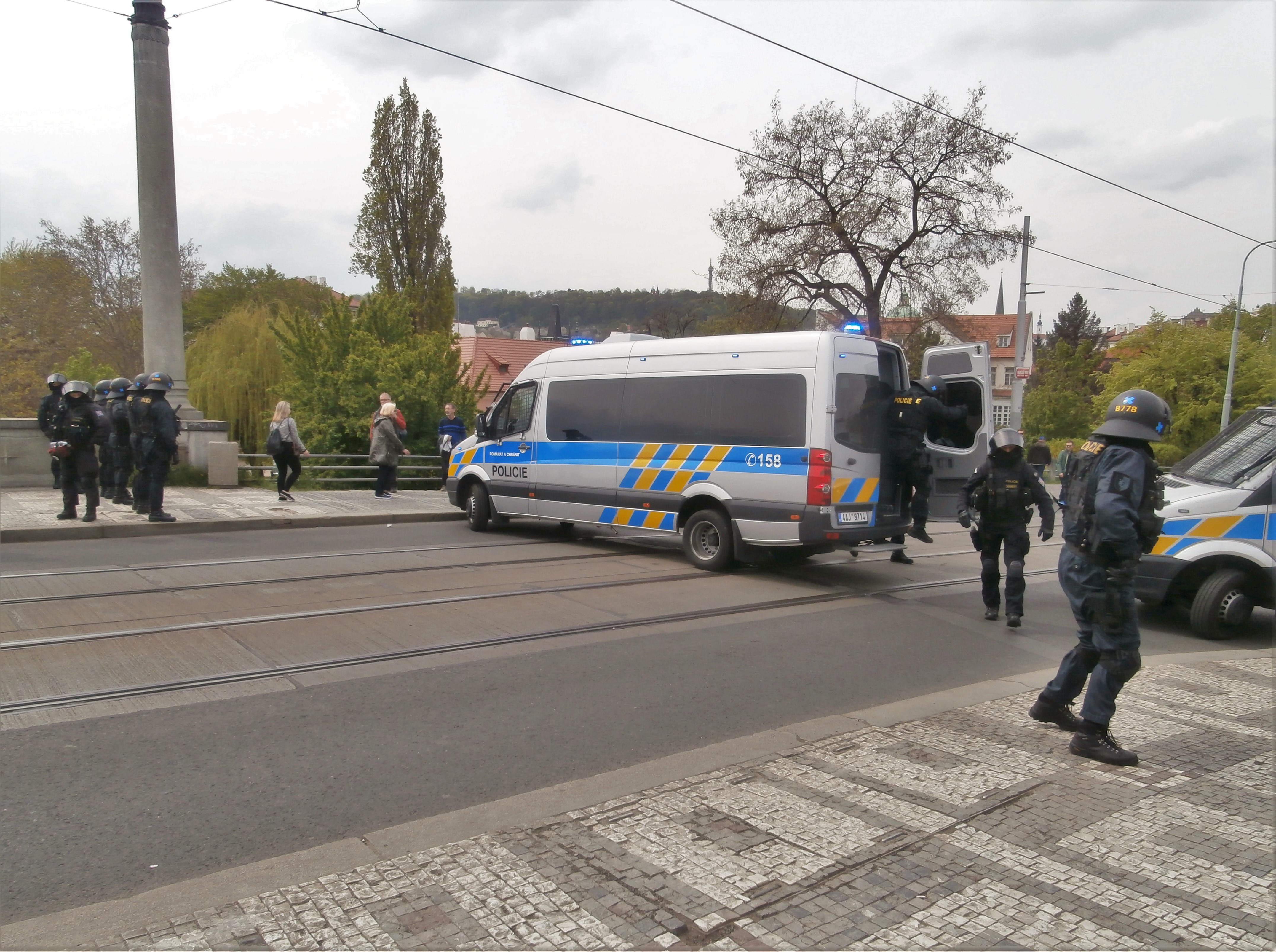 Příslušníci pořádkové jednotky vytvářejí kordon, Praha, Klárov, 1. 5. 2016